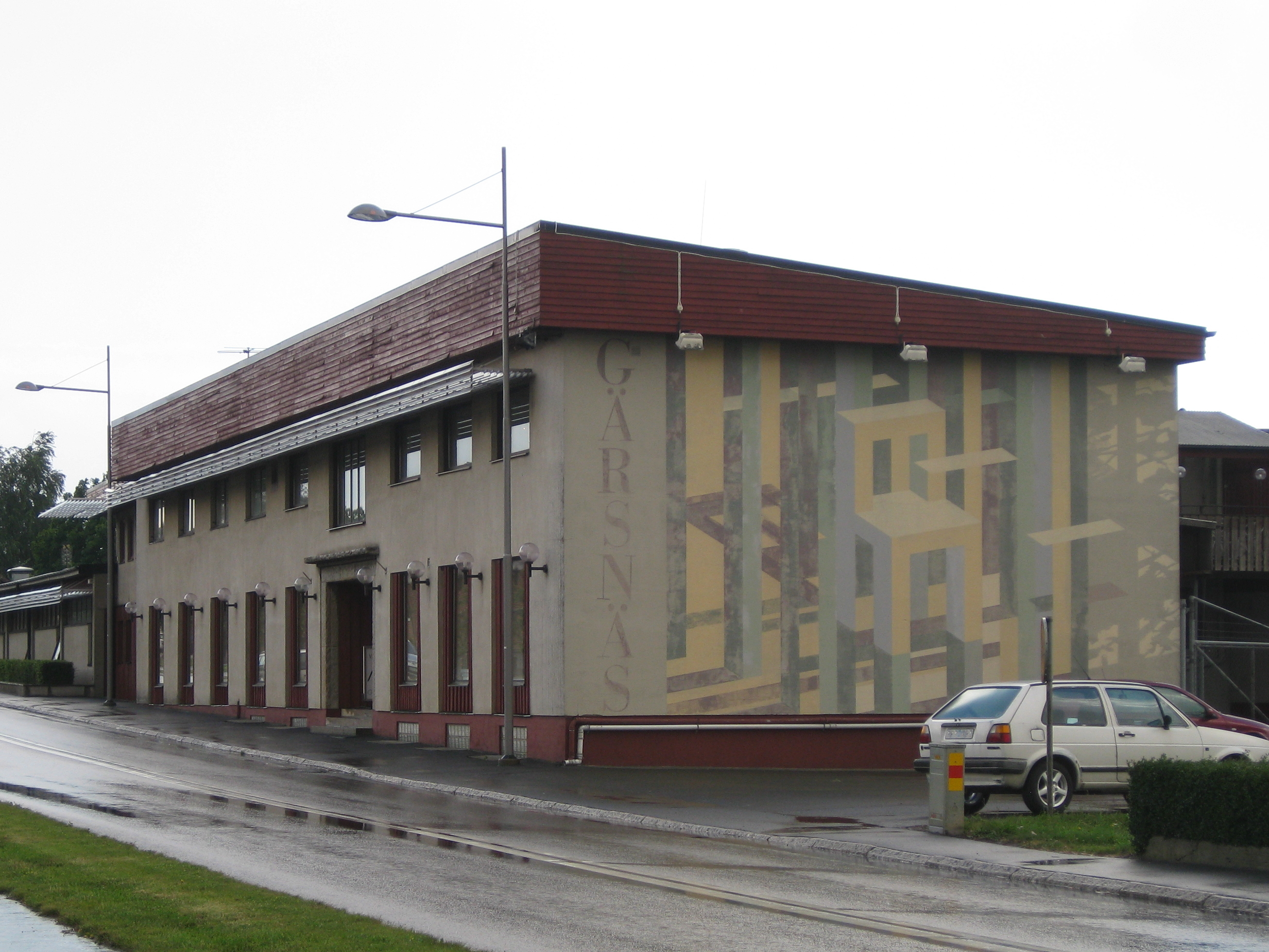 Gärdsnäs AB:s lokaler i Gärsnäs på Österlen.